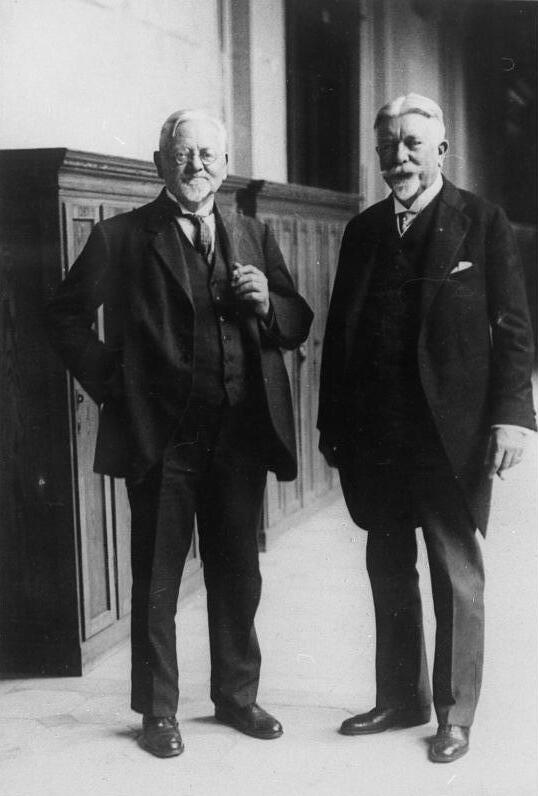 Die Tagung der wissenschaftlichen Gesellschaft für Luftfahrt in der Technischen Hochschule in Berlin-Charlottenburg Der Präsident der wissenschaftlichen Gesellschaft für Luftfahrt Prof. Dr. Johann Schütte (rechts) der berühmte Construkteur der Schütte-Lanz-Luftschiffe und Prof. Parseval (links) der berühmte Construkteur der Parseval-Lenkluftschiffe.